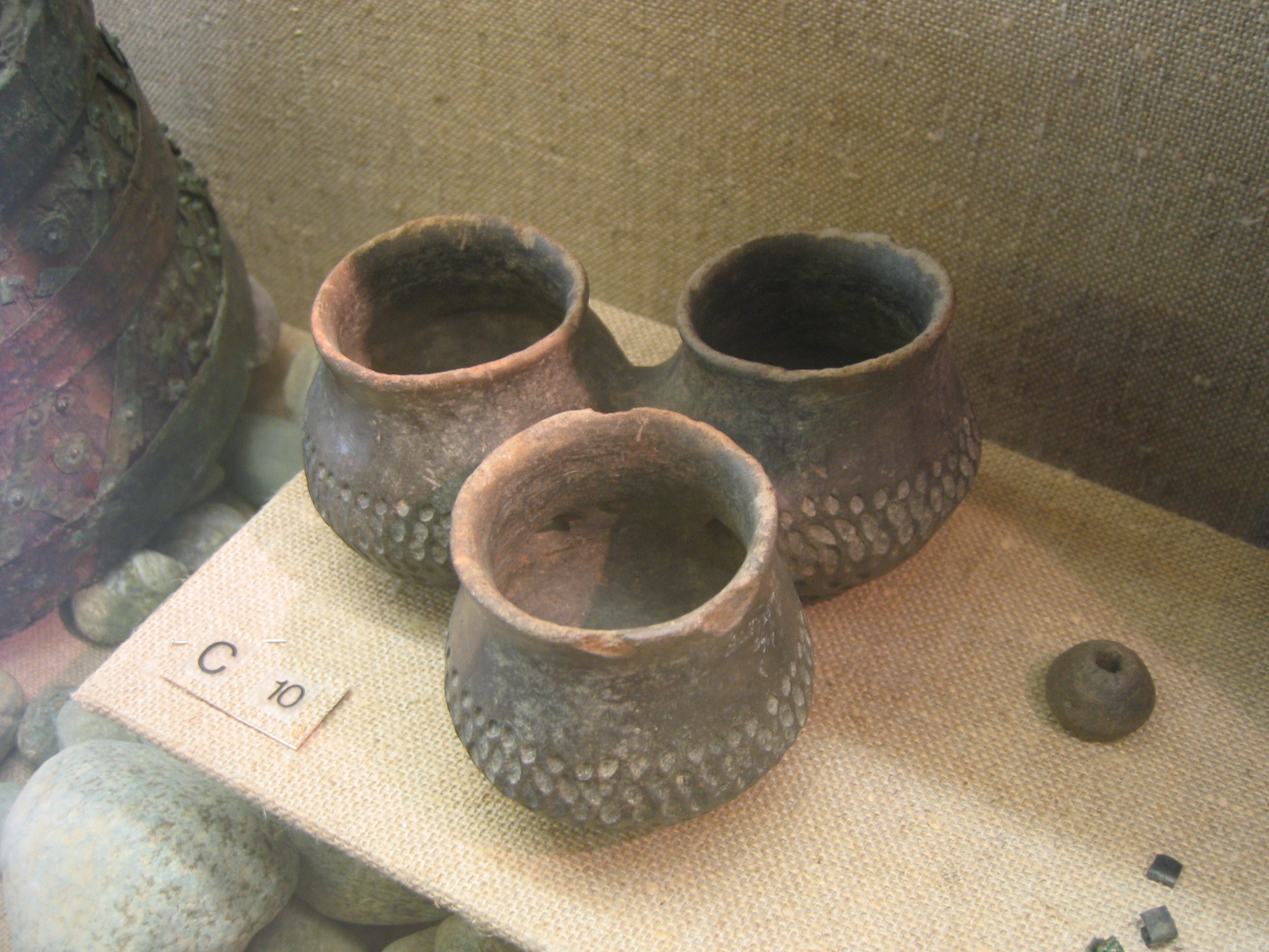 Drillingsgefäß aus dem frühmittelalterlichen Gräberfeld von Güttingen, Grab 38, Baden-Württemberg. Fotografiert im Archäologischen Hegau-Museum, Singen (Hohentwiel).